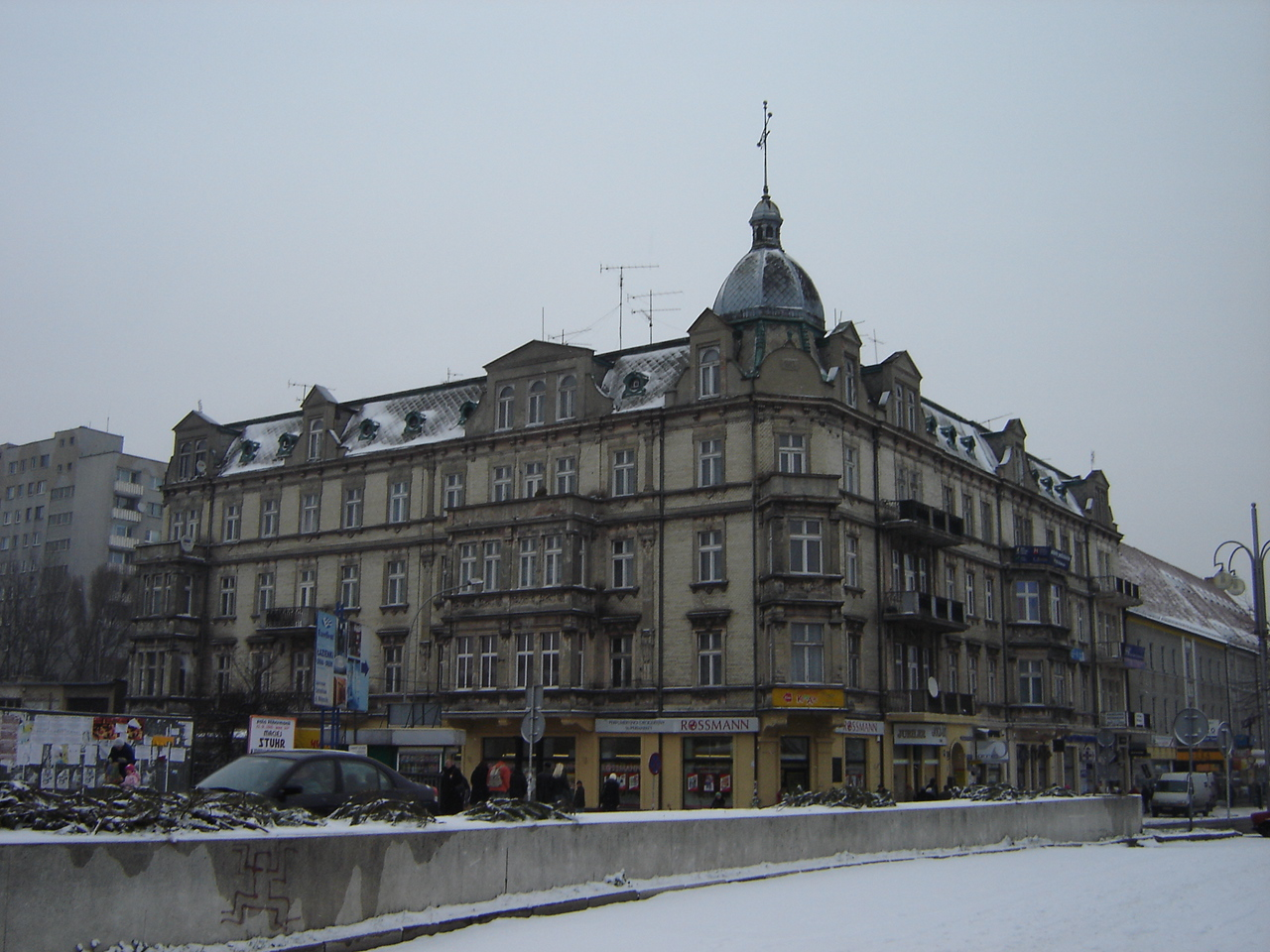 Częstochowa-al NMP dom Frankego